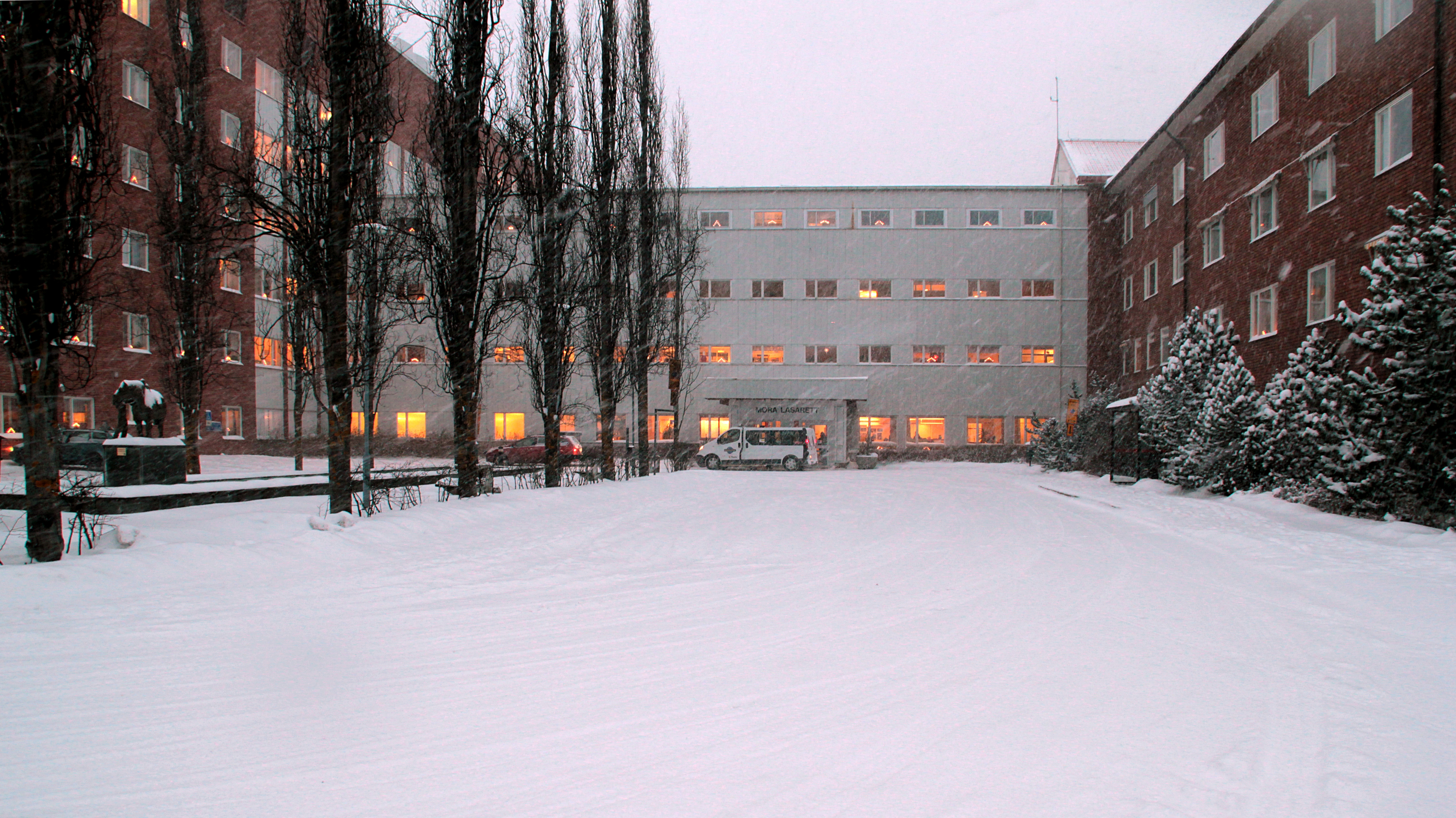 Mora lasarett, huvudentrén. Mora, Dalarnas län, Sverige